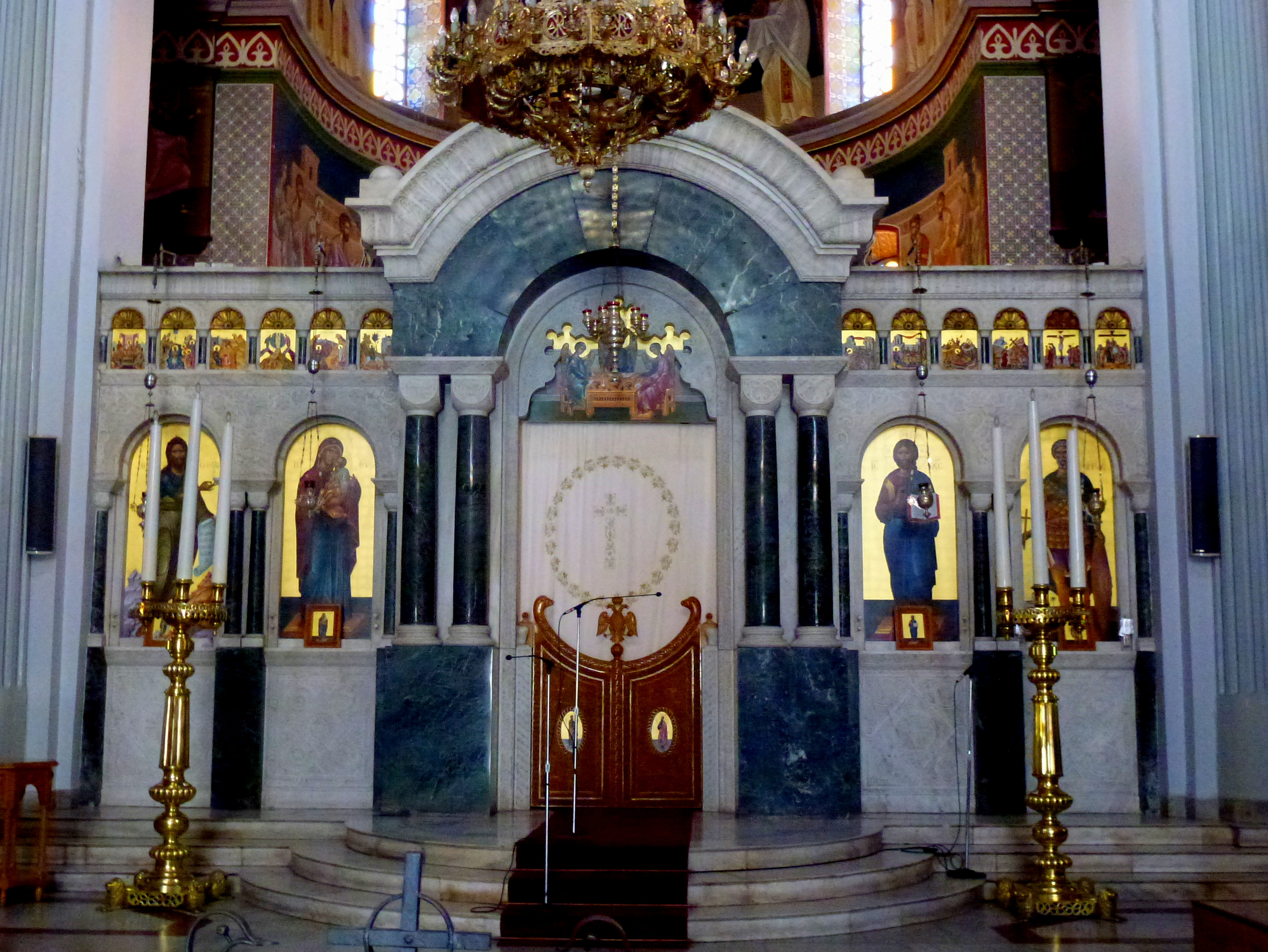 Minas Kathedrale- Ikonastase aus Marmor